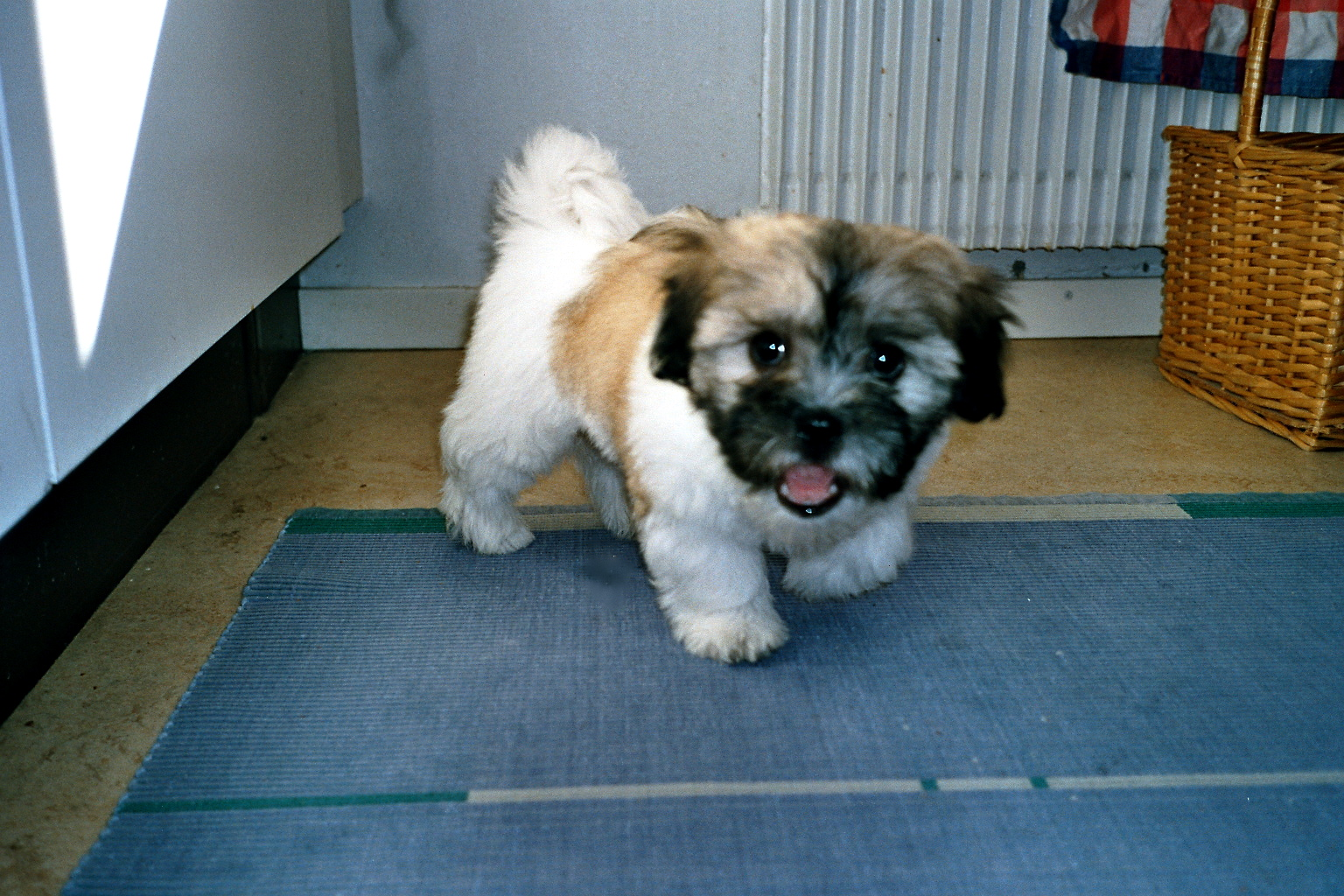 Cotan de Tulear puppy